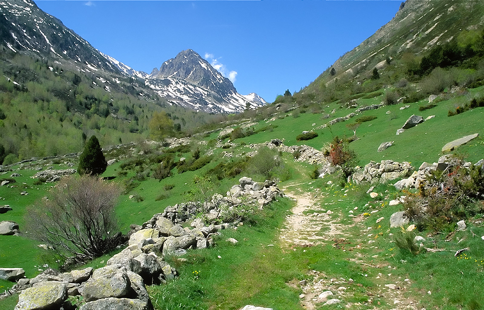 Val de Campcardos, pic de Peiraforca